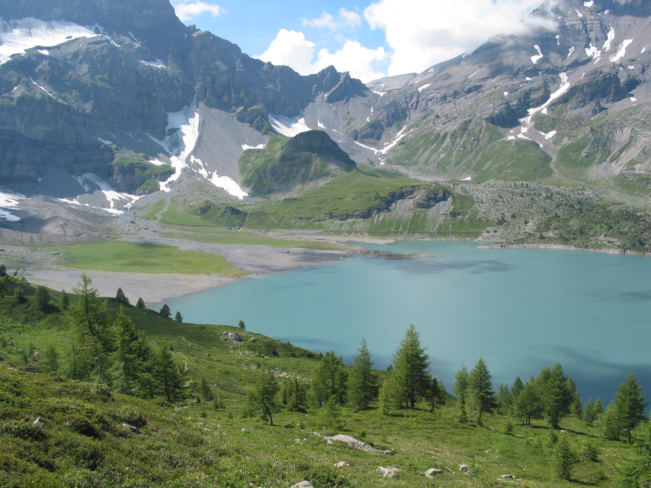 Lac de Salanfe